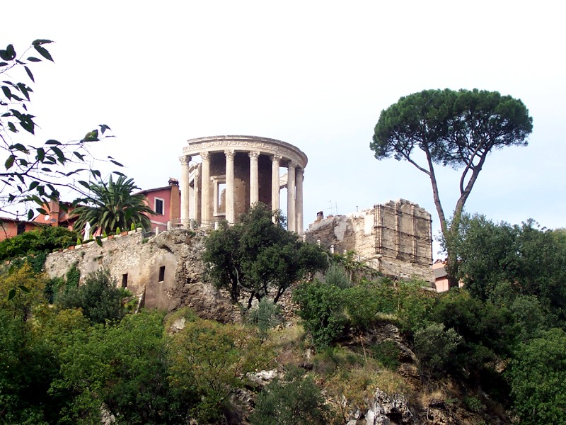 Tivoli - Tempio di Vesta e Tempio della Sibilla